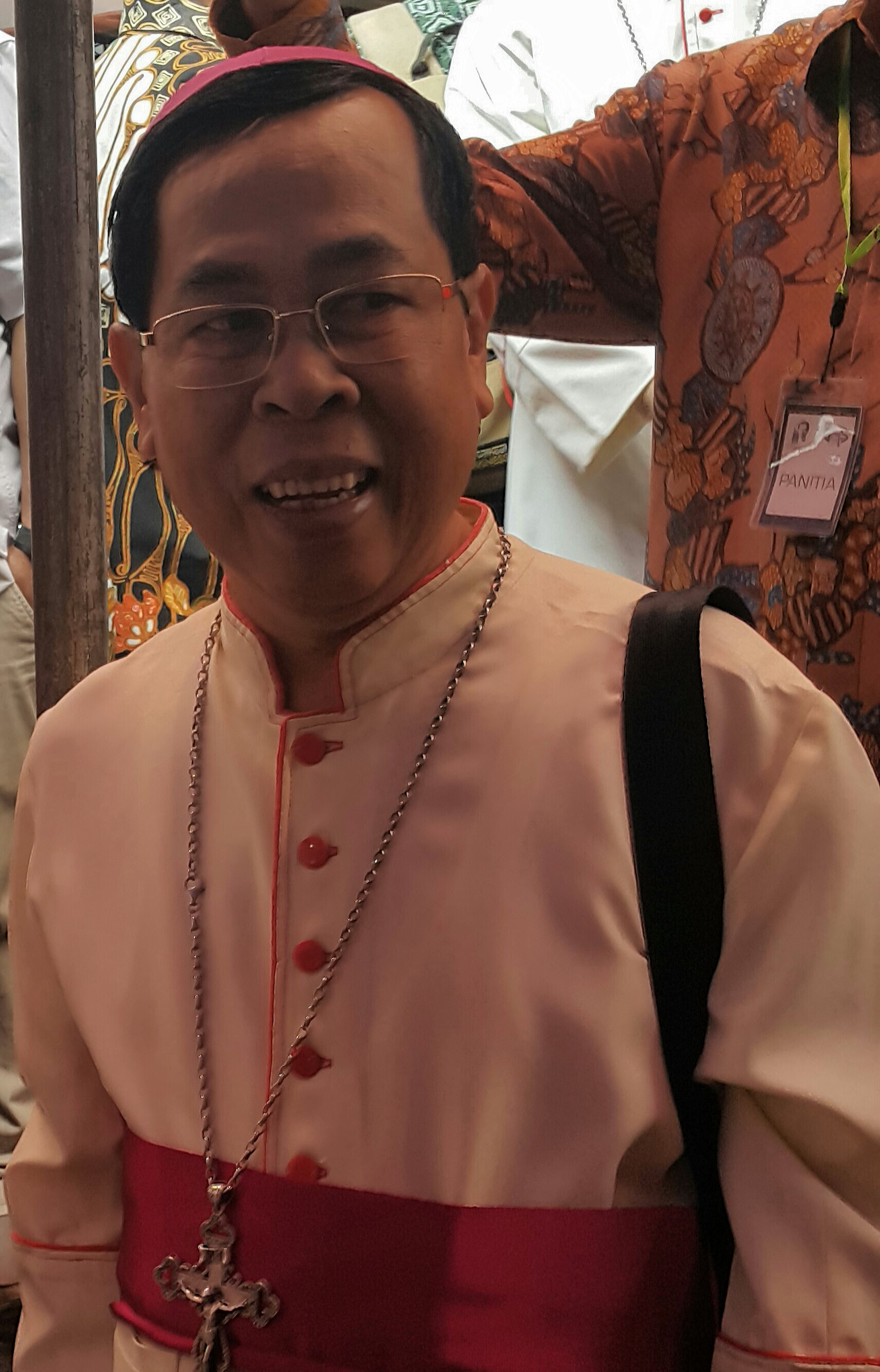 Mgr. Aloysius Sutrisnaatmaka, Uskup Samarinda